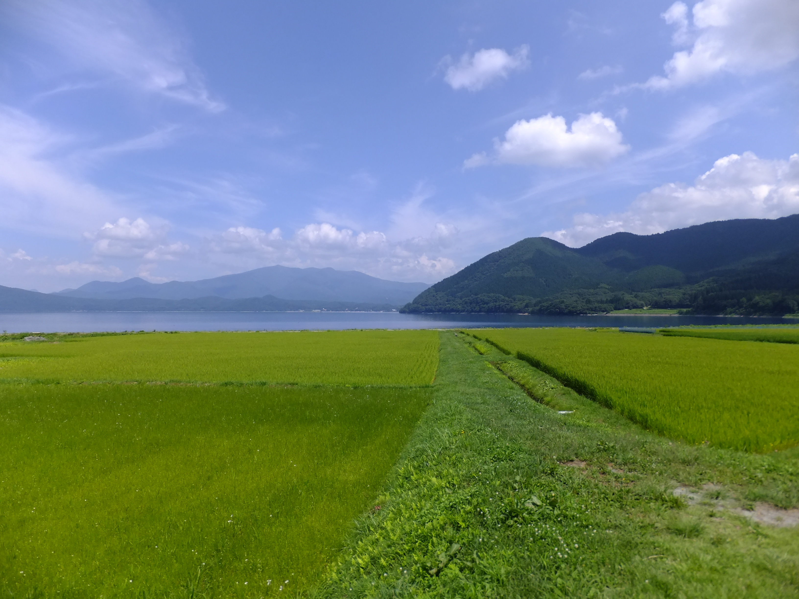 田んぼと田沢湖